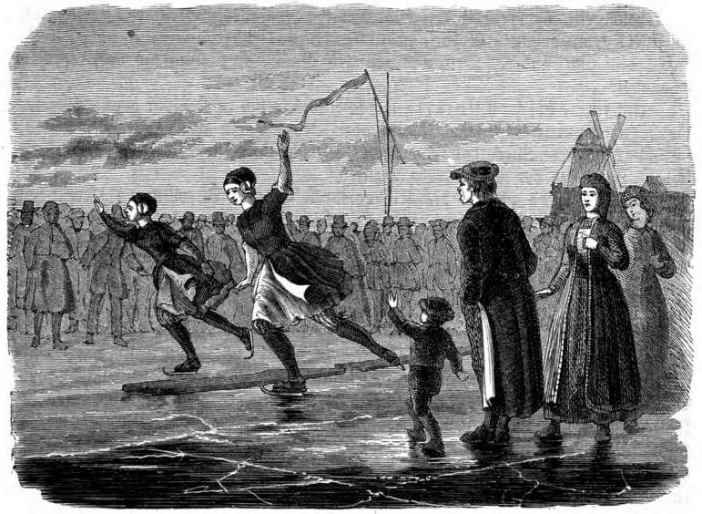 Friesisches Schlittschuhlaufen Wettlaufende Frauen